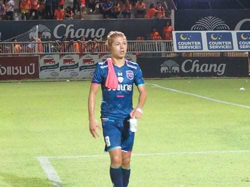 Sho Shimoji